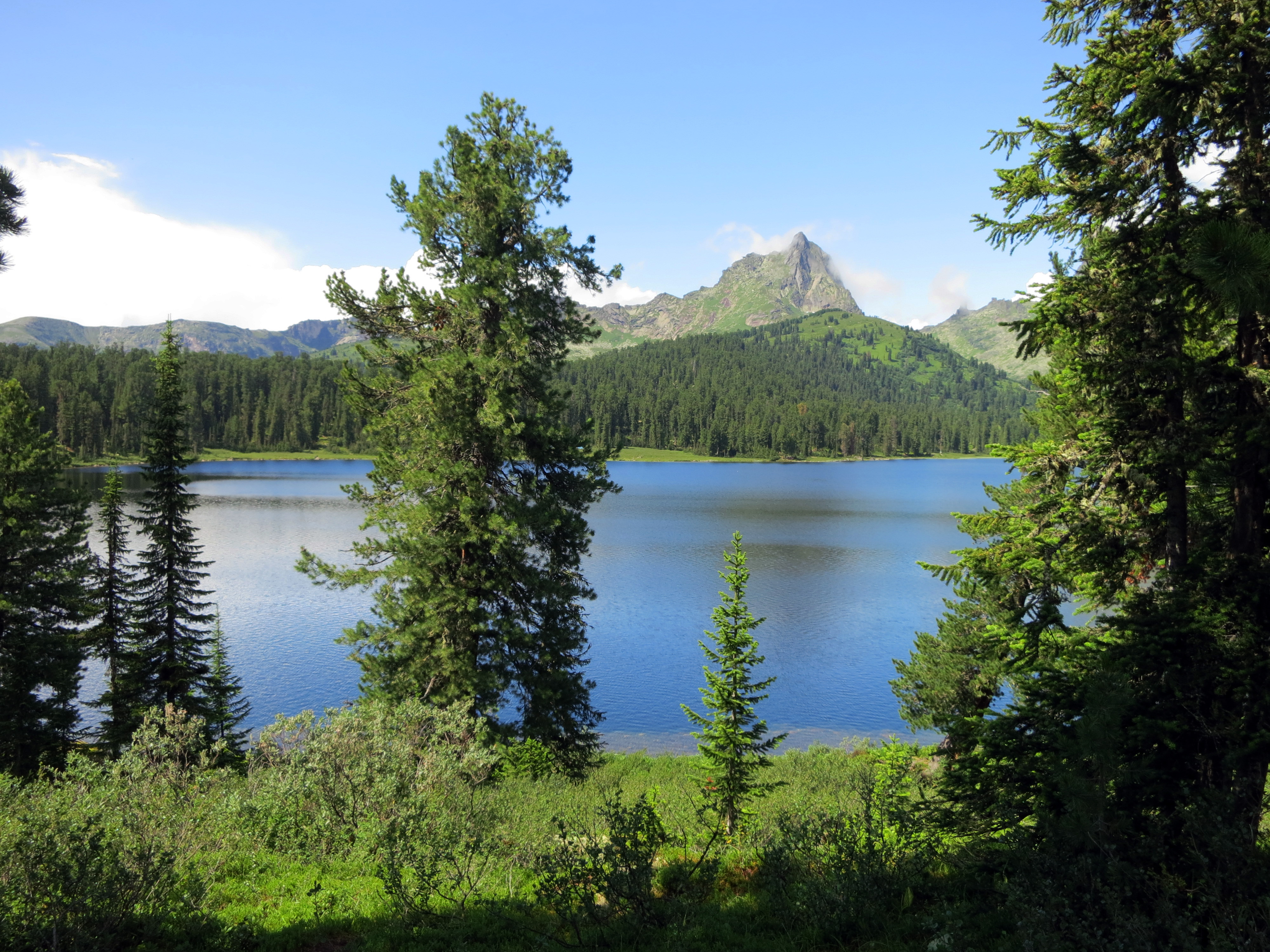 Ергаки: кГБУ "Каратузское лесничество" - кварталы N 84ч, 85ч, 88 - 91 Червизюльского участкового лесничества (лесоустройство 1993 г.)., Ермаковский район, Красноярский край This image is related to the protected area of Russia number 2410078